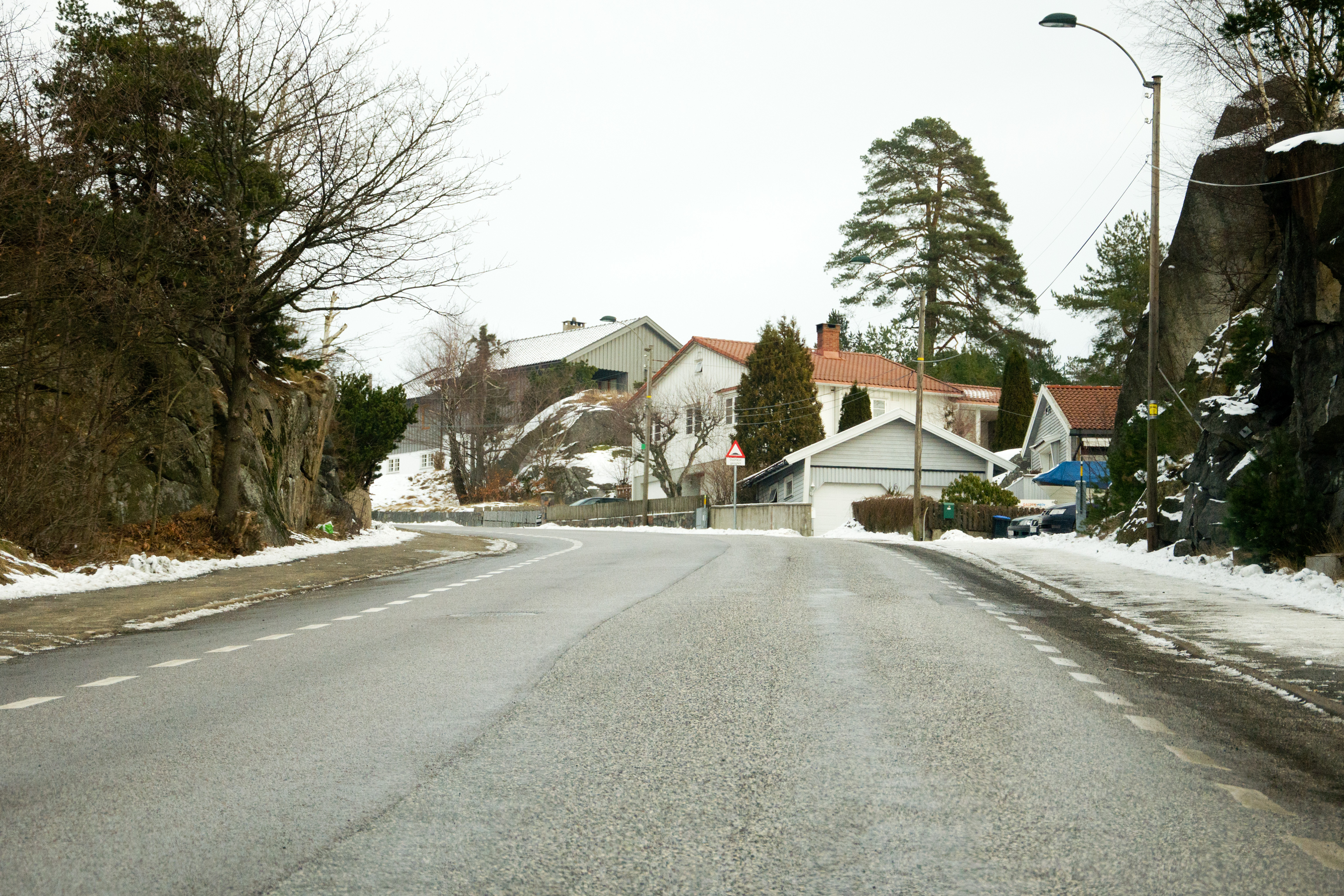 Vestfolds fylkesvei 109 Frostvedtveien i Larvik